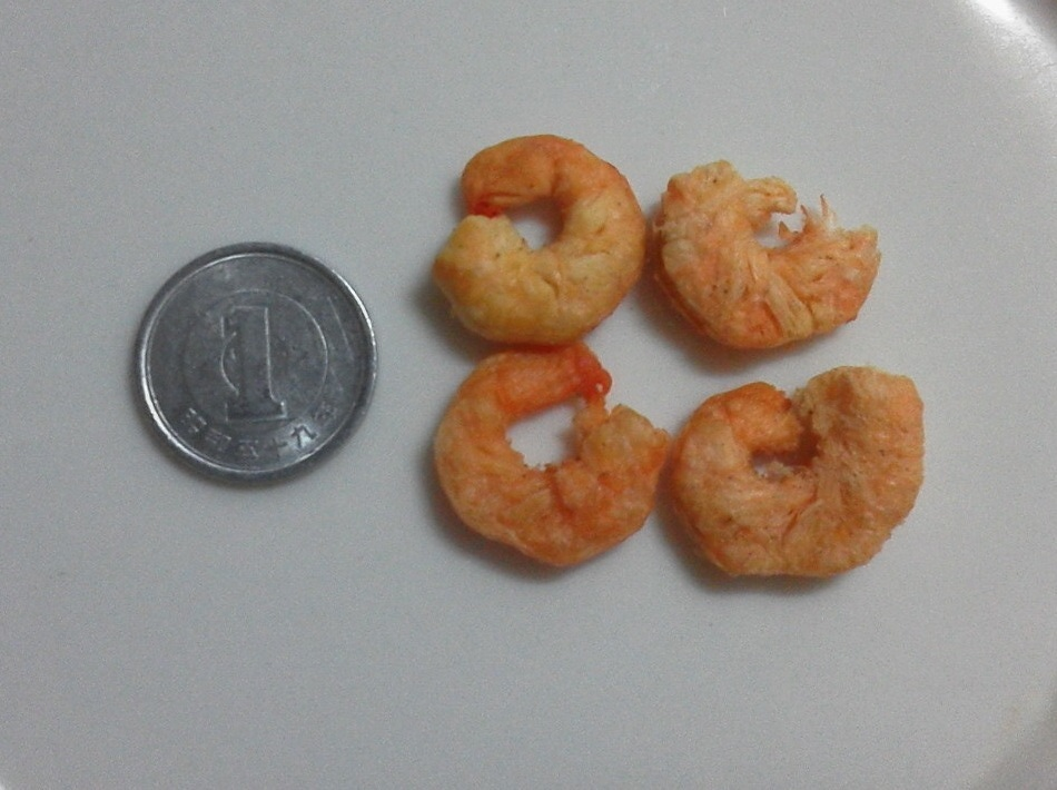 カップヌードルの具材として入っている、フリーズドライ加工されたプーバラン(クルマエビ科)の画像です。